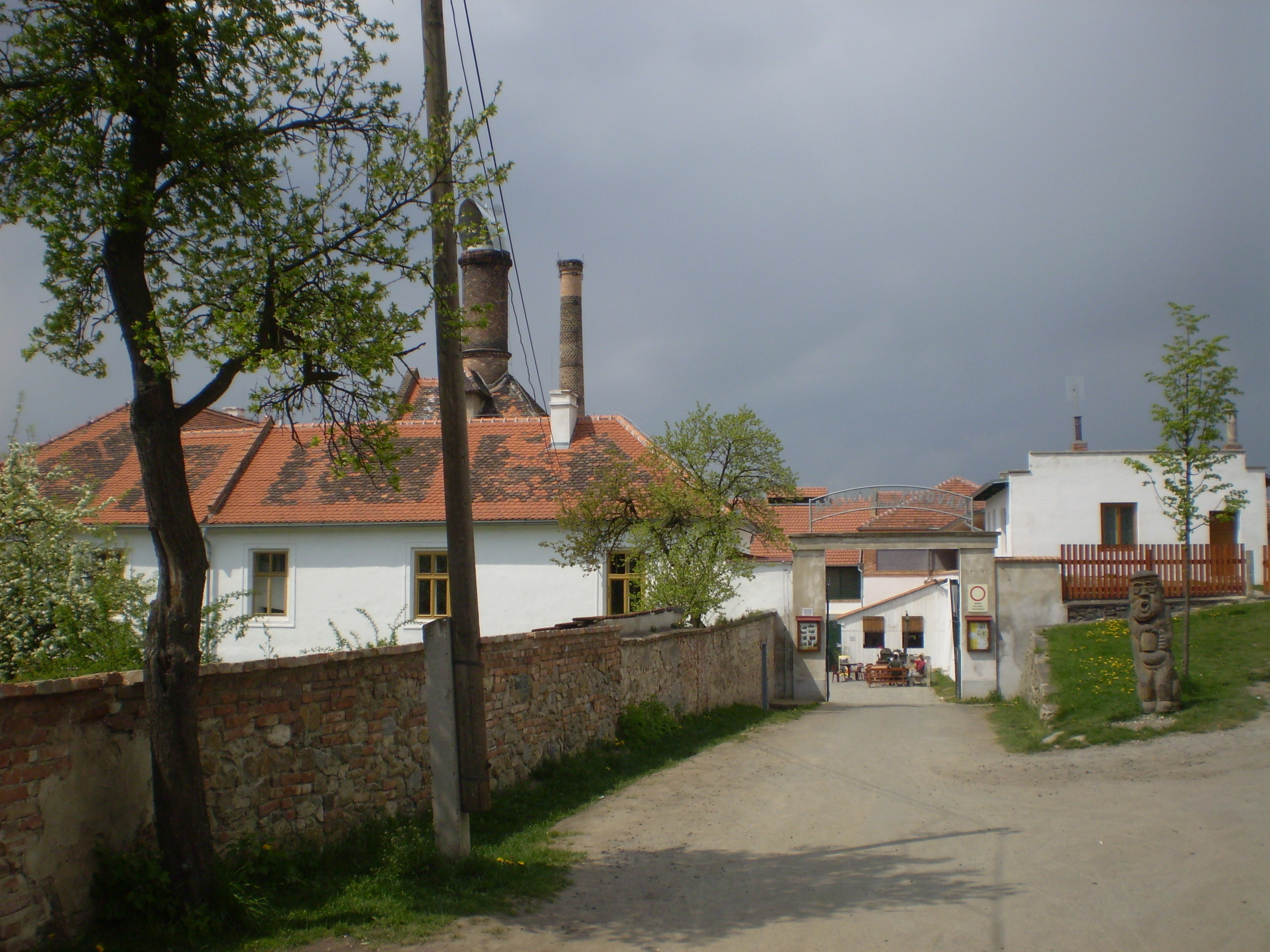 Pivovar Dalešice na Třebíčsku, pohled na pivovar od příjezdové cesty.